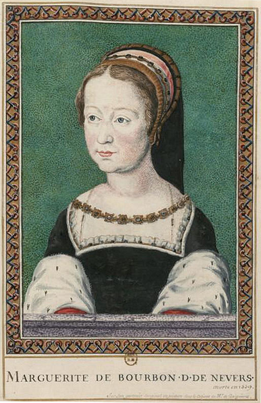 Dessin de Roger de Gaignières d'après un tableau de Corneille de Lyon représentant Madeleine de Valois, fille du roi François Ier. Le portrait était autrefois identifié à tort à Marguerite de Bourbon, duchesse de Nevers (1516-1559). Source : Anne Dubois de Groer, Corneille La Haye, dit Corneille de Lyon, Arthéna, 1997, p. 112-113.